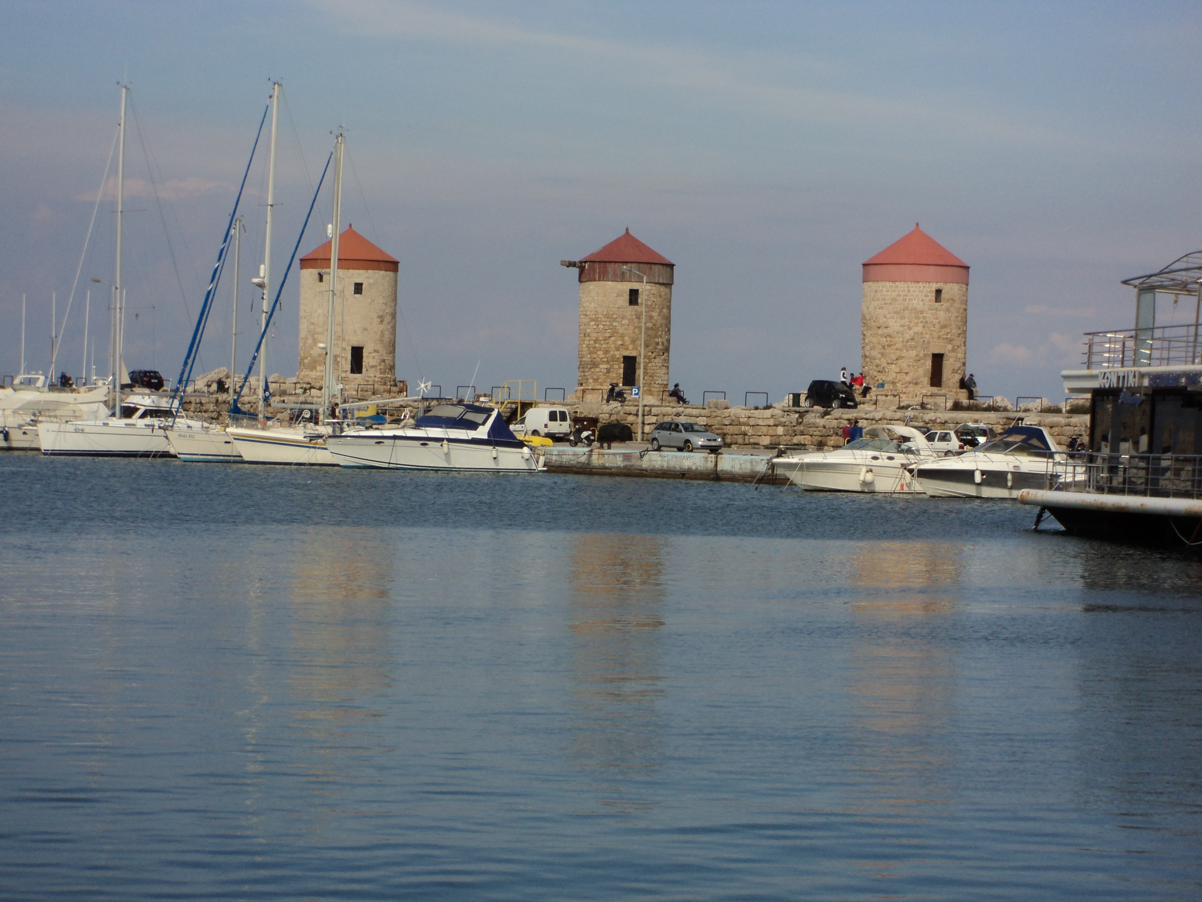 ΟΙ ΜΥΛΟΙ ΤΗΣ ΡΟΔΟΥ